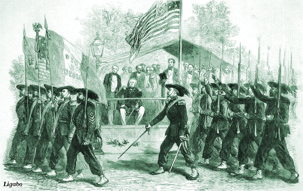 La "Garibaldi Guard", 39º reggimento di fanteria dell'esercito unionista, sfila di fronte al presidente Lincoln nel 1861